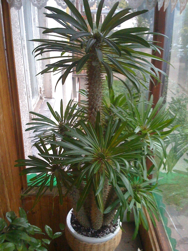 Stambialapis tukvis (Pachypodium lamerei)